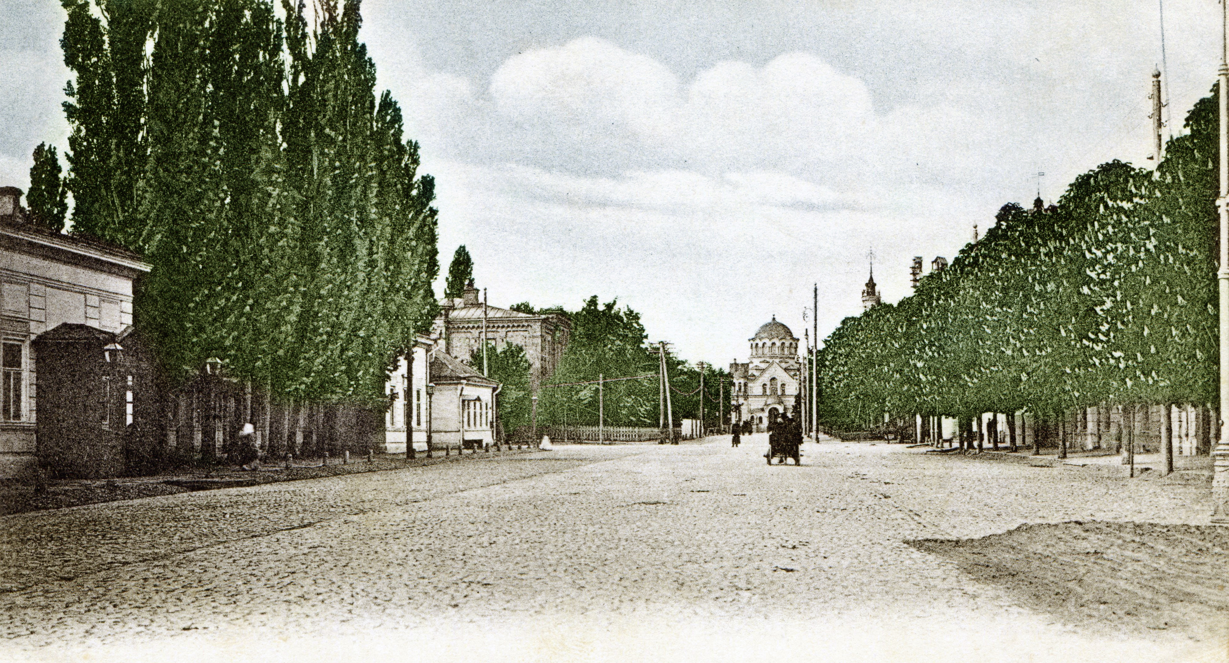 Будинок цивільного губернатора (зліва). Липська вулиця. Київ